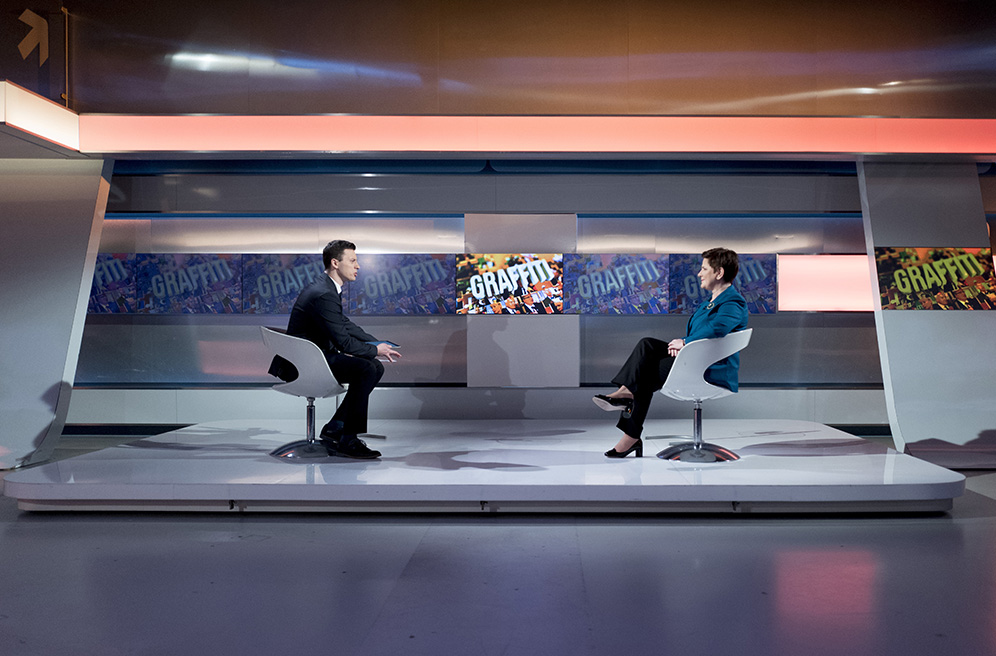 Warszawa, Polsat News. Premier Beata Szydło była gościem programu "Graffiti", prowadzący Piotr Witwicki.